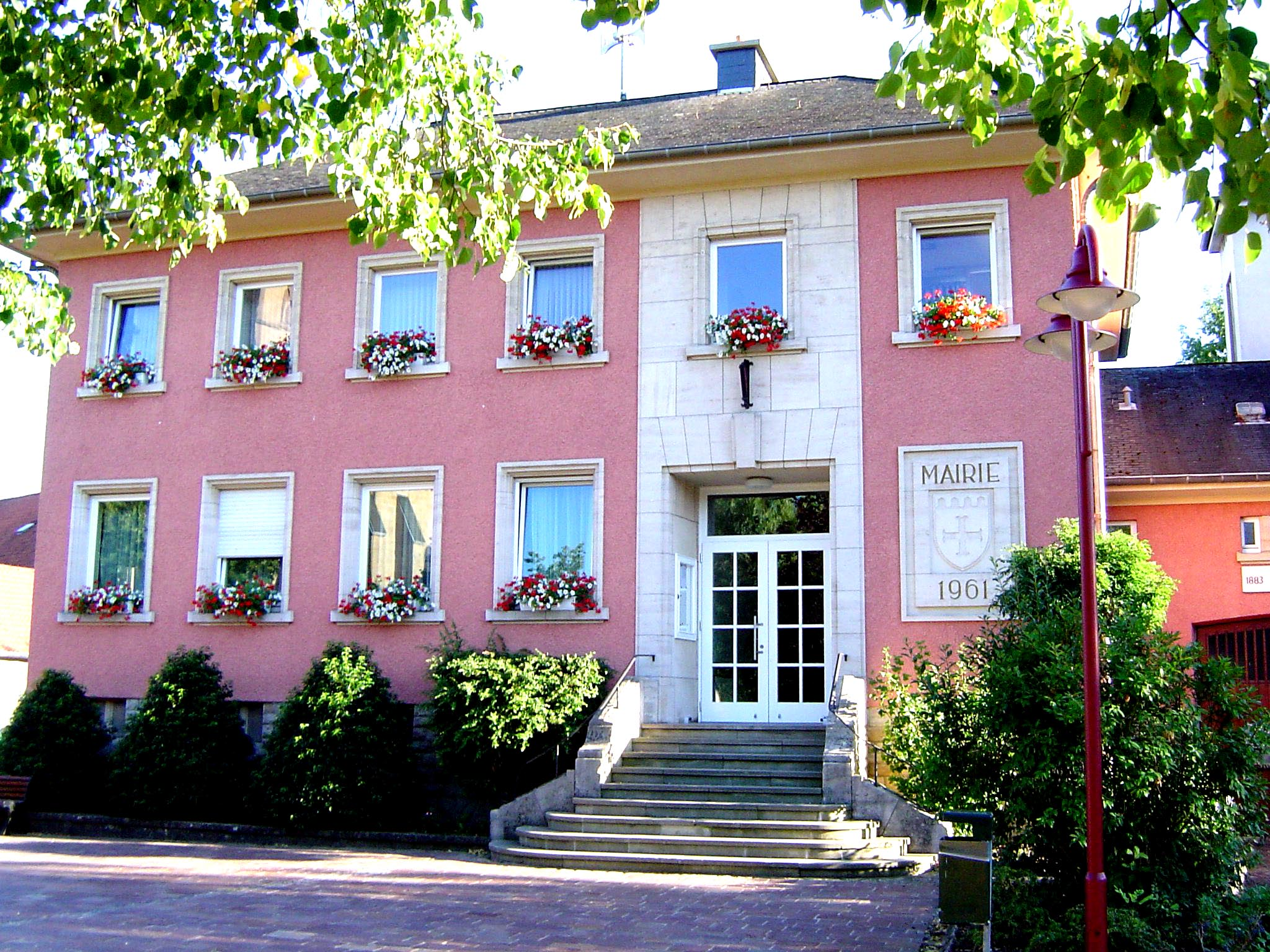 Bech: D'Stadhaus (2006)